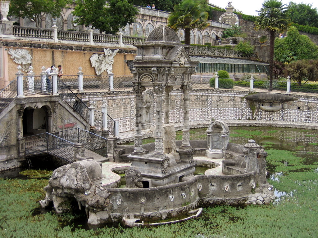 No sólo Madrid goza de un estanque con este nombre. El de Betanzos, con su merendero central, tiene indudablemente mucho más encanto.